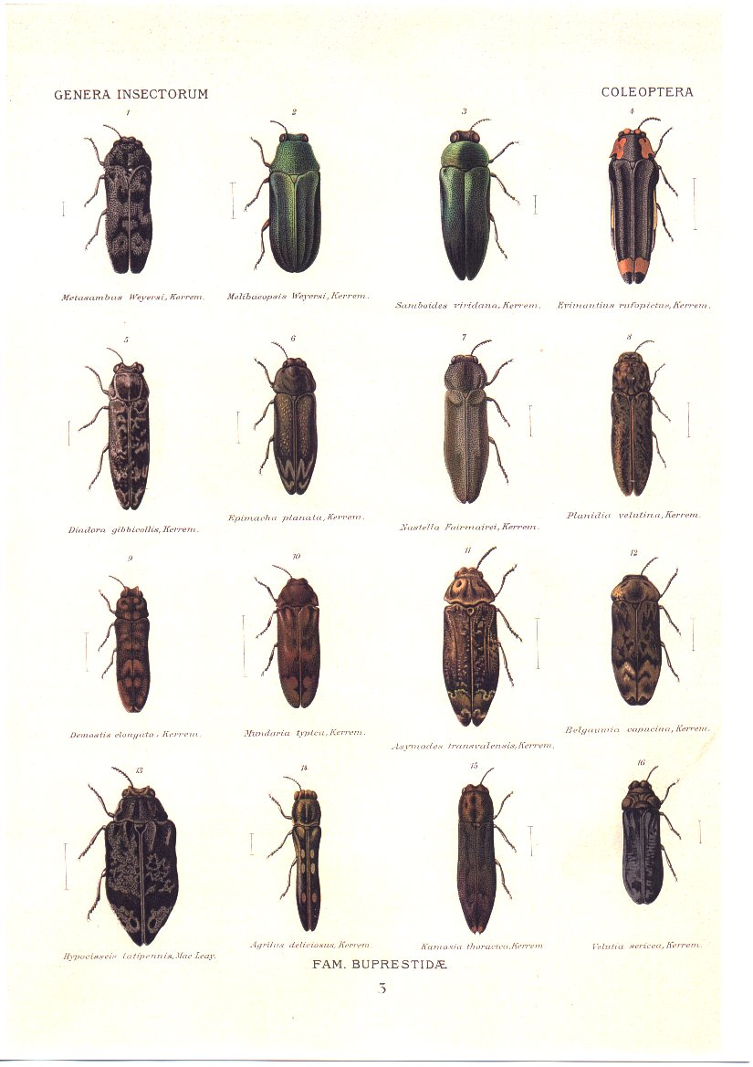 Metasambus Weyersi Kerrem. = Metasambus weyersi (Kerremans, 1900) Melibaeopsis Weyersi Kerrem. = Melibaeopsis rufipecta (Quedenfeldt, 1886) Samboides viridana Kerrem. = Cisseis westwoodii (Gory & Laporte, 1839) Evimantius rufopictus Kerrem. = Evimantius rufopictus Deyrolle, 1864 Diadora gibbicollis Kerrem. = Cyphothorax gibbicollis (Kerremans, 1897) Epimacha planata Kerrem. = Epimacha planata (Kerremans, 1900) Nastella Fairmairei Kerrem. = Nastella chalcodes (Wiedemann, 1821) Planidia velutina Kerrem. = Planidia velutina Kerremans, 1899 Demostis elongata Kerrem. = Demostis elongata (Kerremans, 1900) Mundaria typica Kerrem. = Mundaria typica Kerremans, 1894 Asymades transvalensis Kerrem. = Asymades transvalensis Kerremans, 1893 Belgaumia capucina Kerrem. = Belgaumia capucinea (Kerremans, 1893) Hypocisseis latipennis Mac Leay. = Hypocisseis latipennis (Macleay, 1872) Agrilus deliciosus Kerrem. = Agrilus deliciosus Kerremans, 1897 Kamosia thoracica Kerrem. = Sjoestedtius thoracicus (Kerremans, 1903) Velutia sericea Kerrem. = Velutia sericea Kerremans, 1900